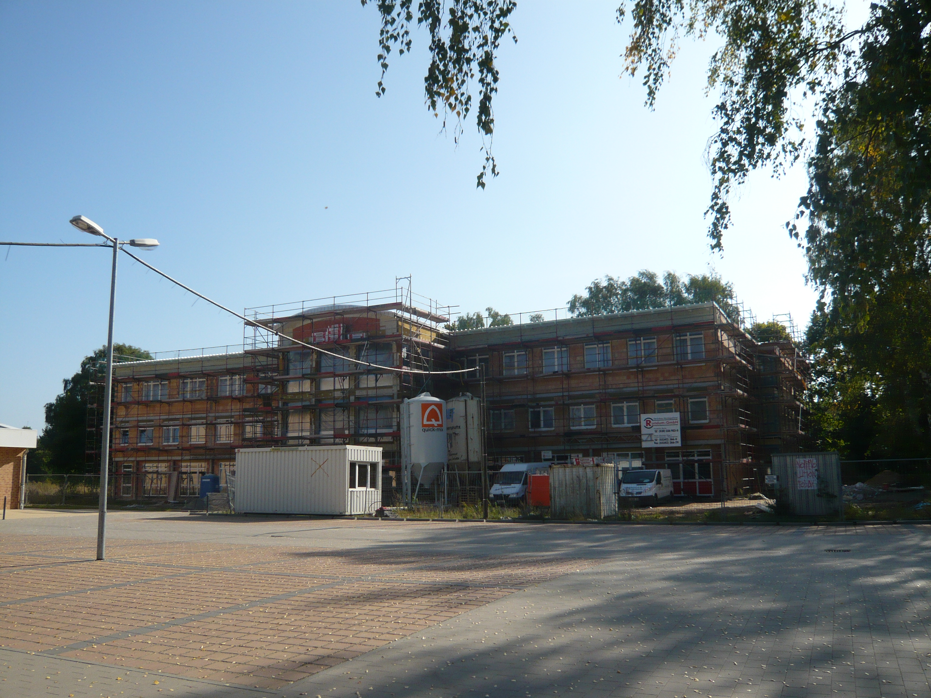 Wandlitz_Schulneubau Prenzlauer Chaussee